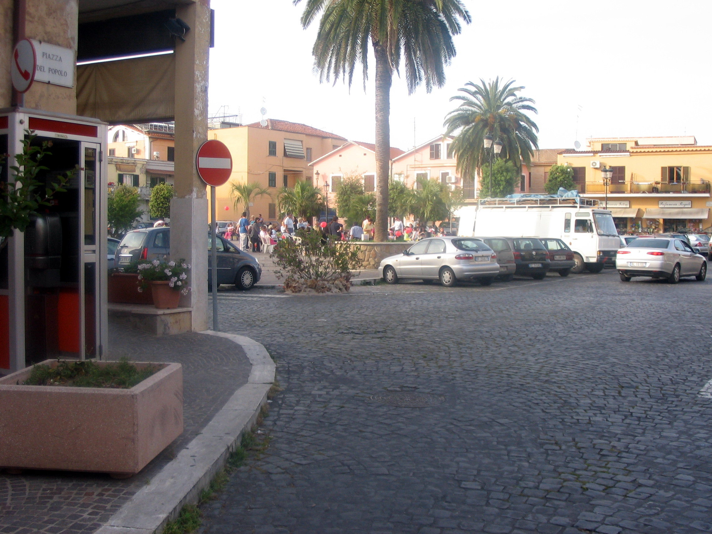 Ardea, Lazio